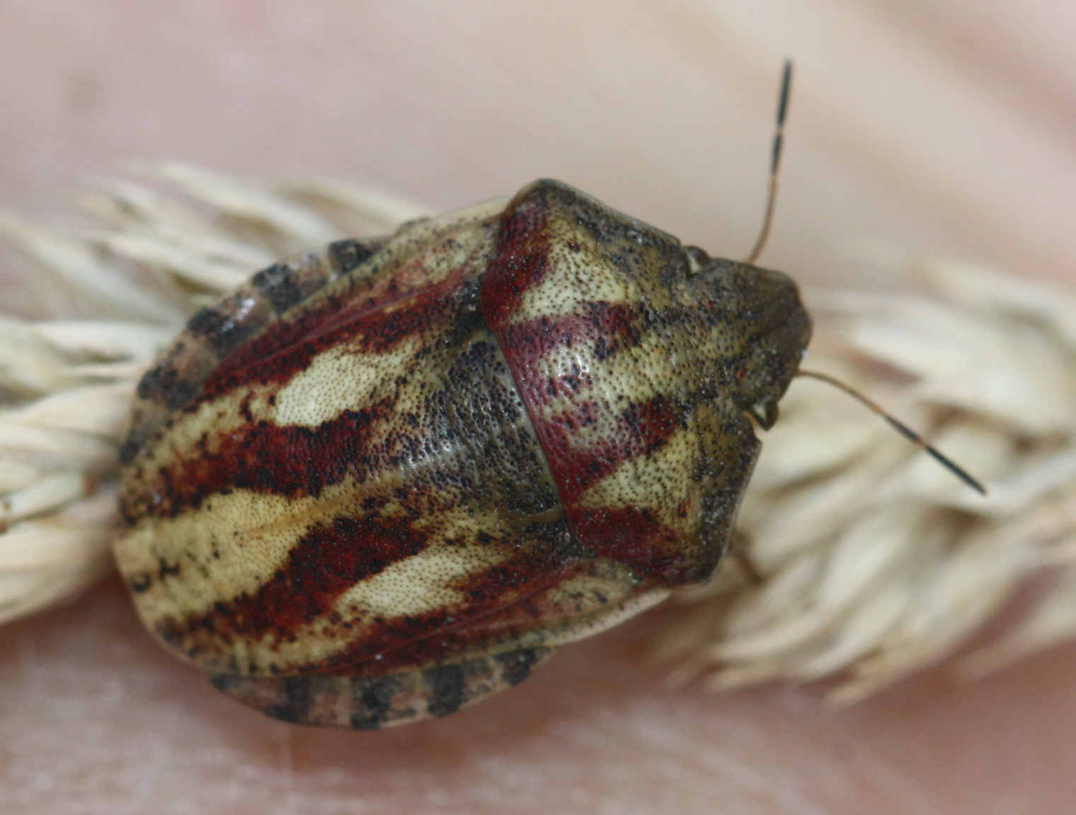 Schildkrötenwanze (Eurygaster testudinaria) am 3.7.2017 in der Schwetzinger Hardt